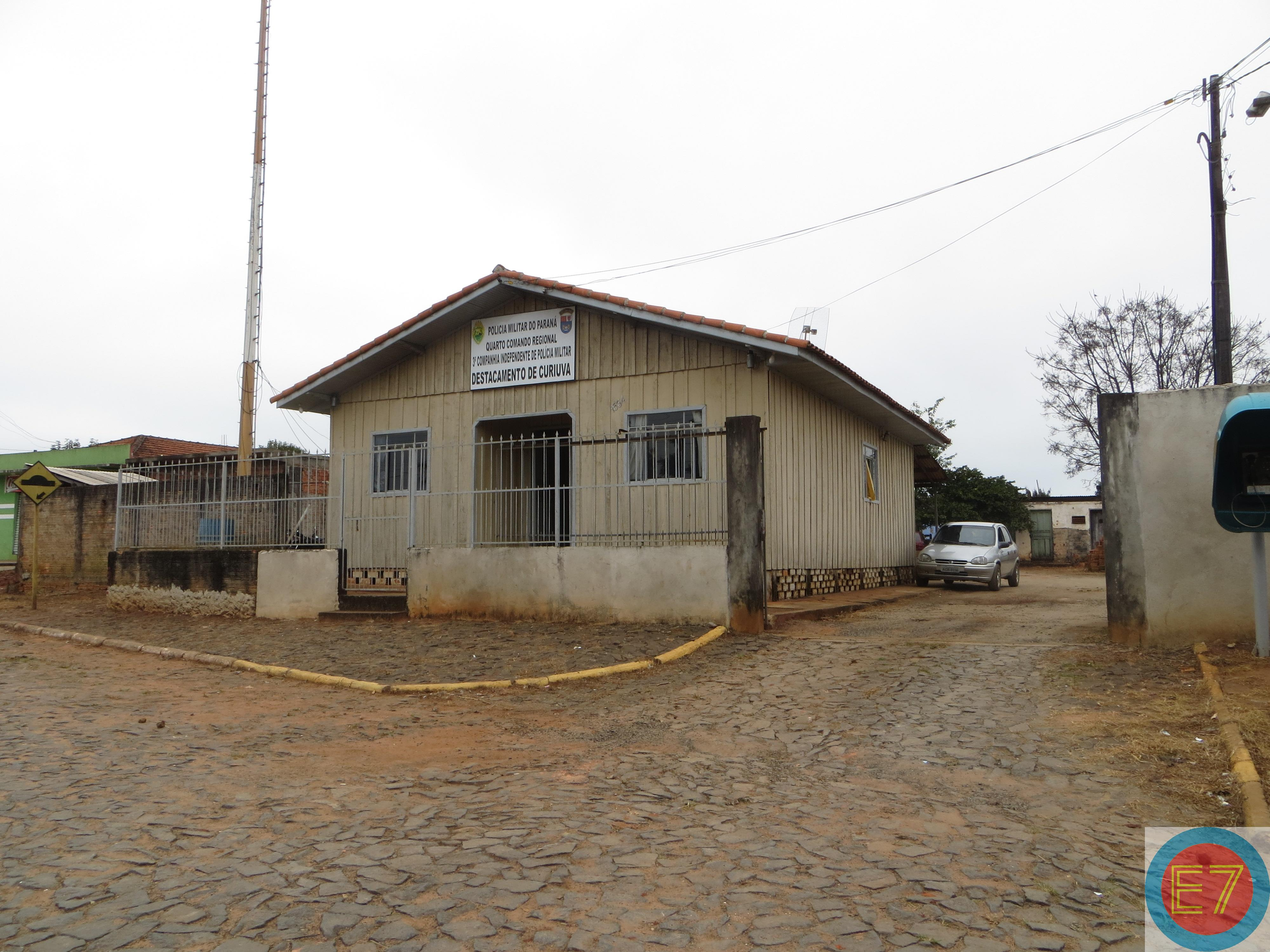 Destacamento da Polícia Militar do Paraná (3ª Companhia Independente), Curiúva, Paraná, Brasil.